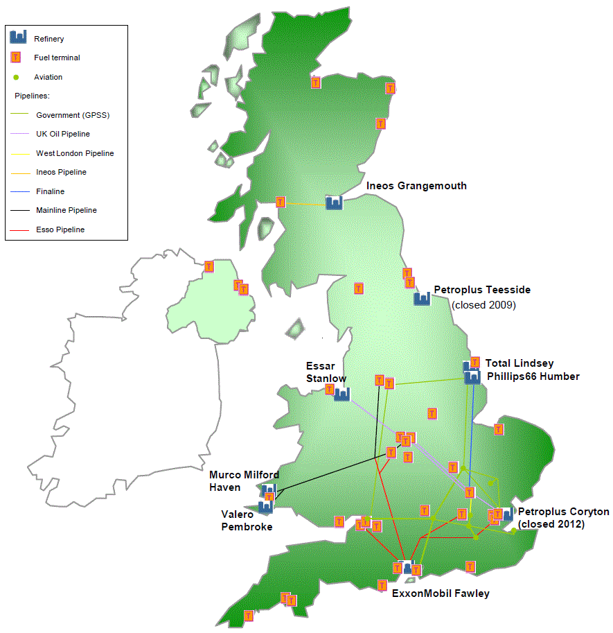 Raffineries, dépôts de carburants et oléoducs au Royaume-Uni en 2013.